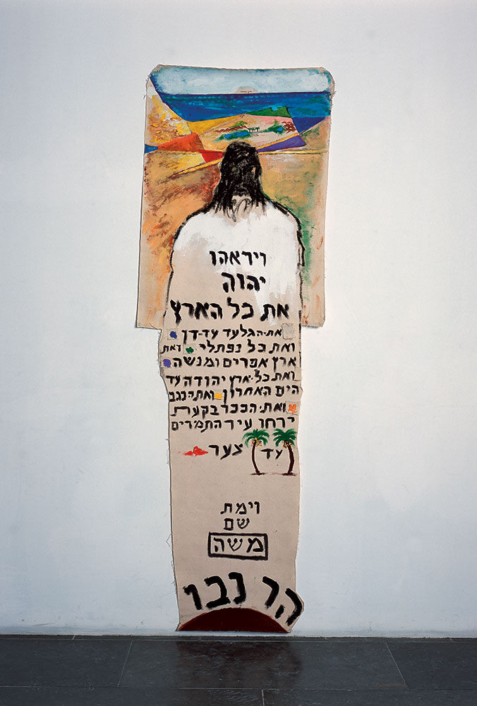 משה (1977-1978), אקריליק ועפרונות צבעוניים עד בד, 70x212 ס״מ, אוסף מוזיאון ישראל, ירושלים